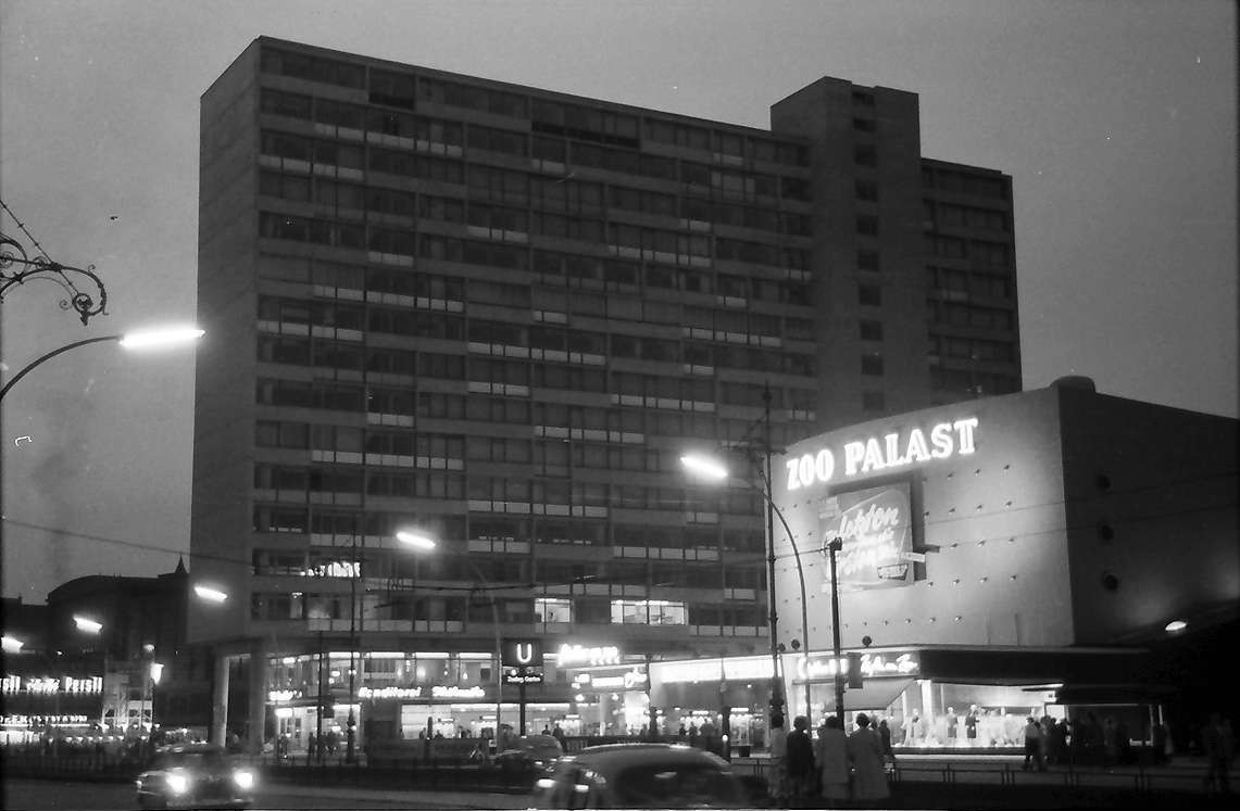 Hardenbergstraße mit Zoo Palast und DOB-Hochhaus in Berlin-Charlottenburg.